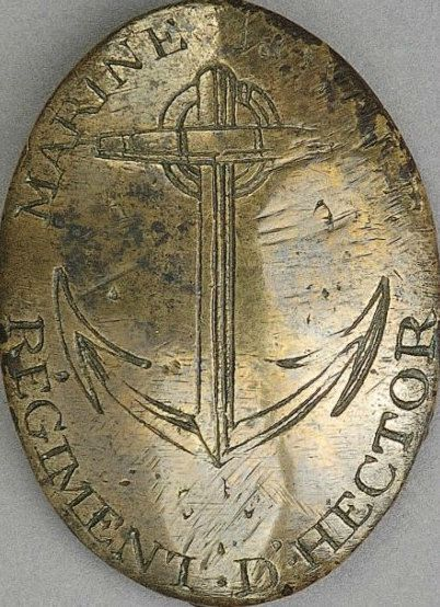 Plaque de poitrine du régiment d'hector pendant la Révolution française.